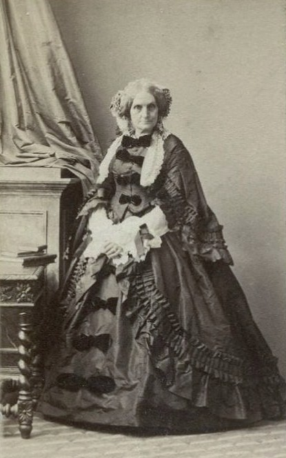 Ольга Станиславовна Нарышкина, ур. Потоцкая (1802—1861)